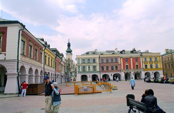 Zamosc (Poland)